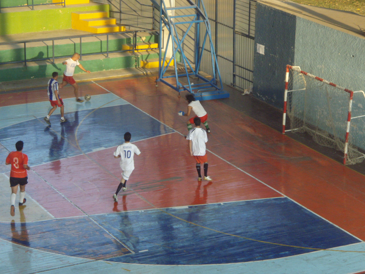 Partido de fubol sala protagonizado por aficonados cubanos. Mariposa, Ciudad Deportiva.